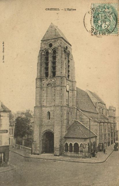 Église Saint-Christophe de Créteil